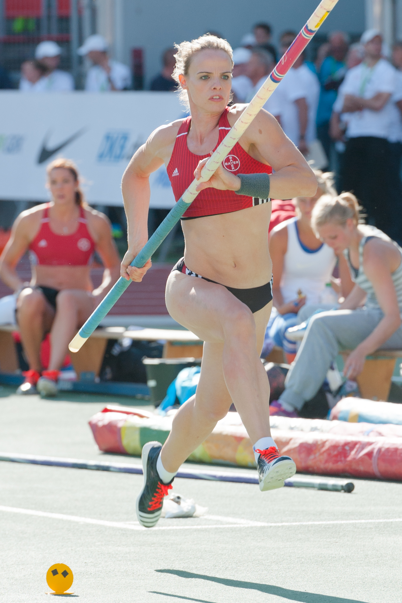 Deutsche Leichtathletik-Meisterschaften 2015: Frauen Stabhochsprung - Silke Spiegelburg, TSV Bayer 04 Leverkusen